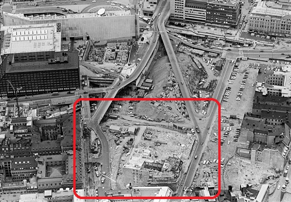 Kvarteret Trollhättan med blivande Trollhättan 32 och 31. Bebyggelsen i hörnet Regeringsgatan / Jakobsgatan kvarstår fortfarande (revs i slutet av 1972)